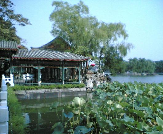 Beihai Lake in Beijing